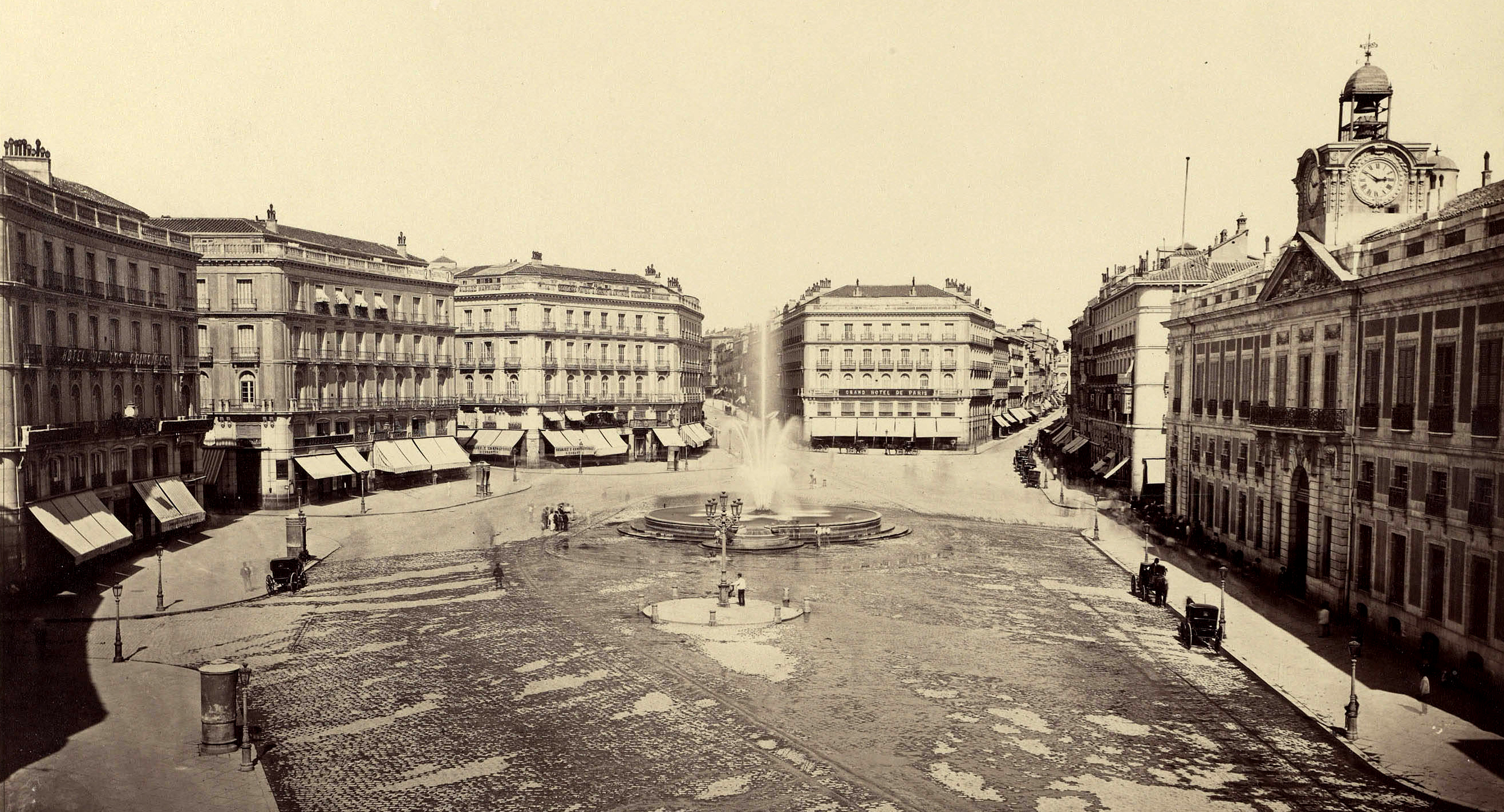 Juan Laurent, Madrid, vista general de la puerta del Sol, ca. 1870, papel albúmina.